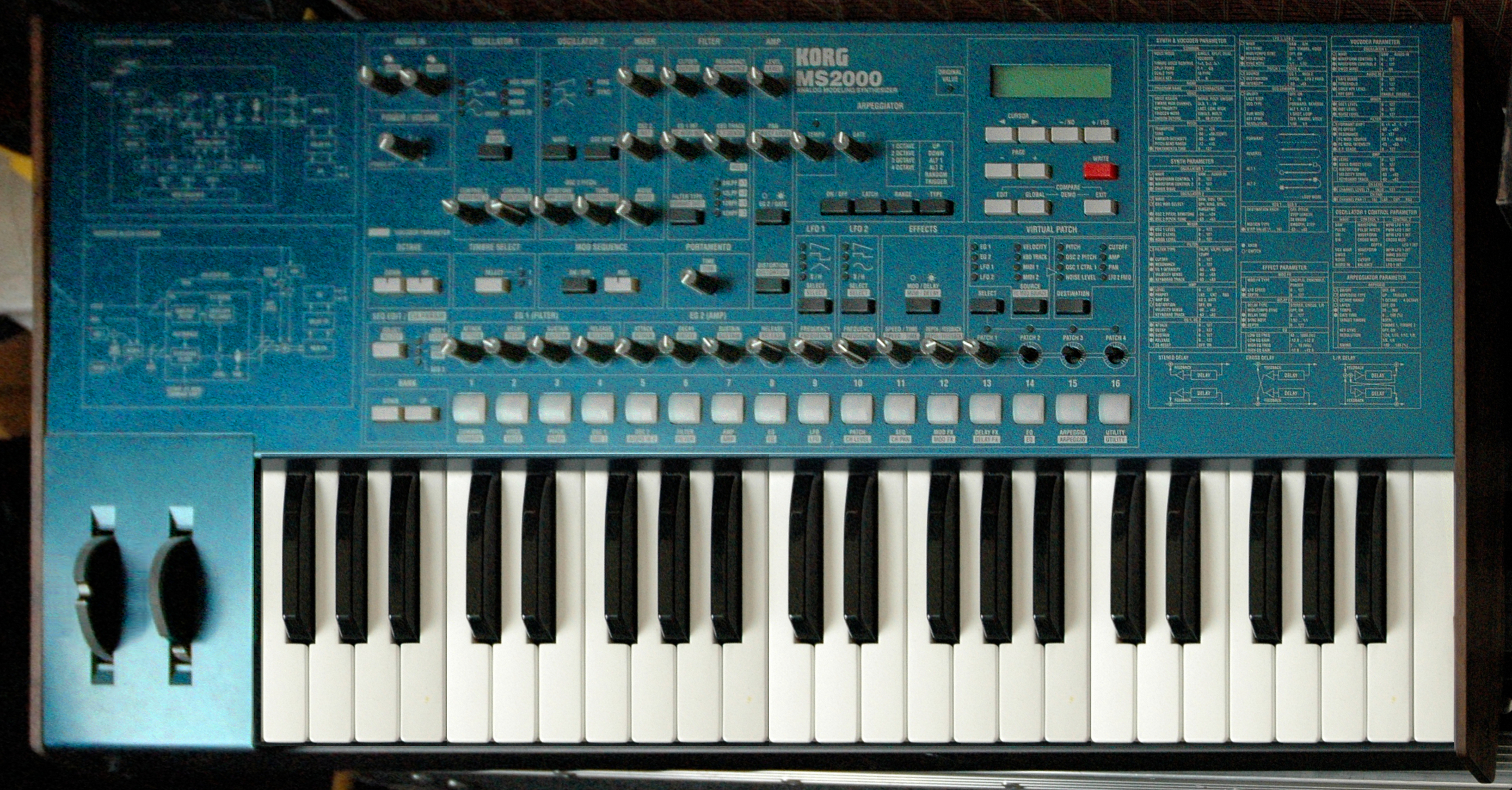 Korg MS2000 front view